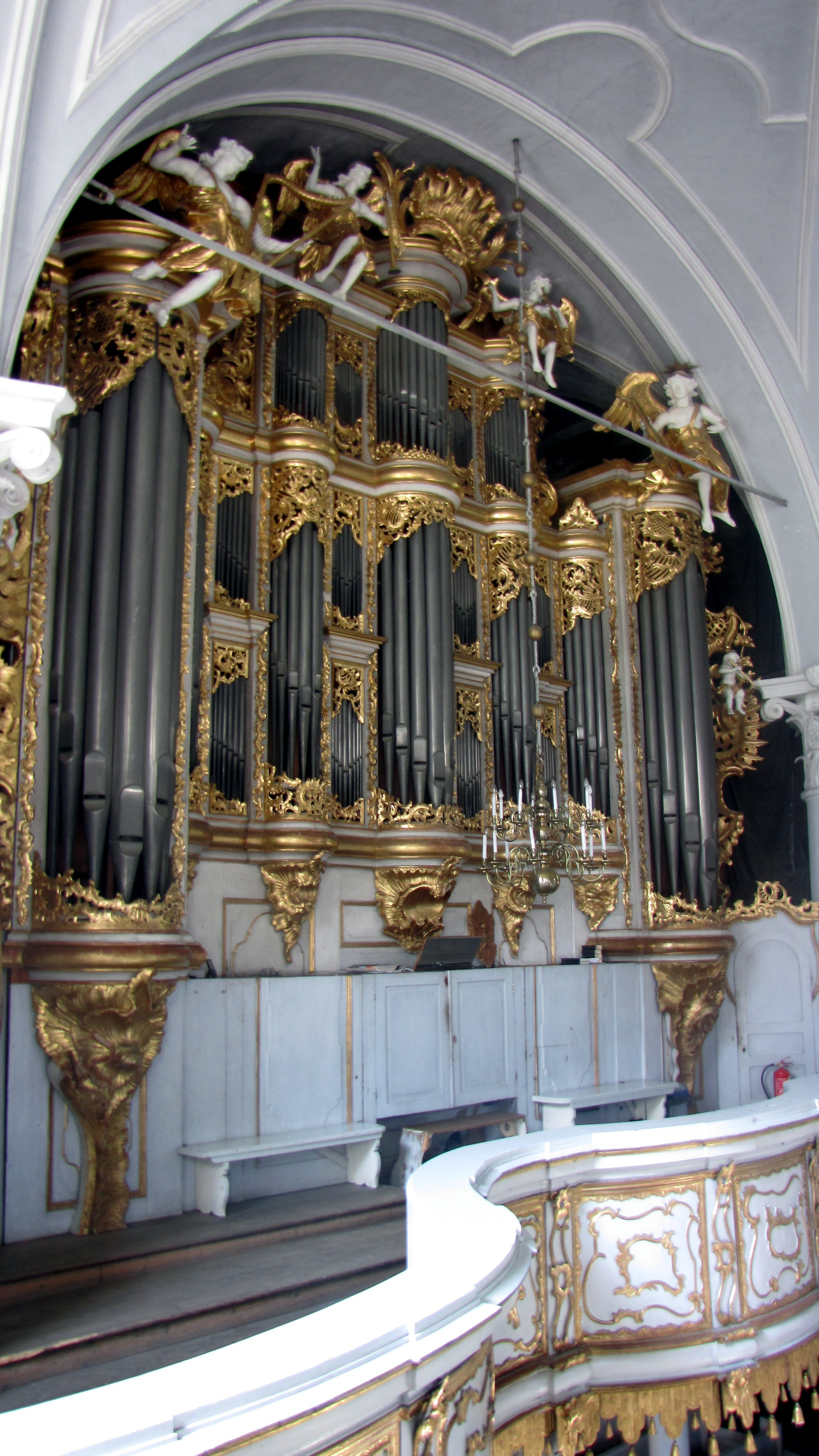 Grüneberg-Orgel in der Dreifaltigkeitskirche in Libau (Lettland)